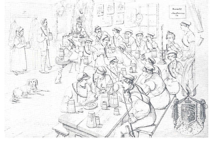 Bierherzogtum Lichtenhain, Lithographie aus den 1840er Jahren, Rechte abgelaufen